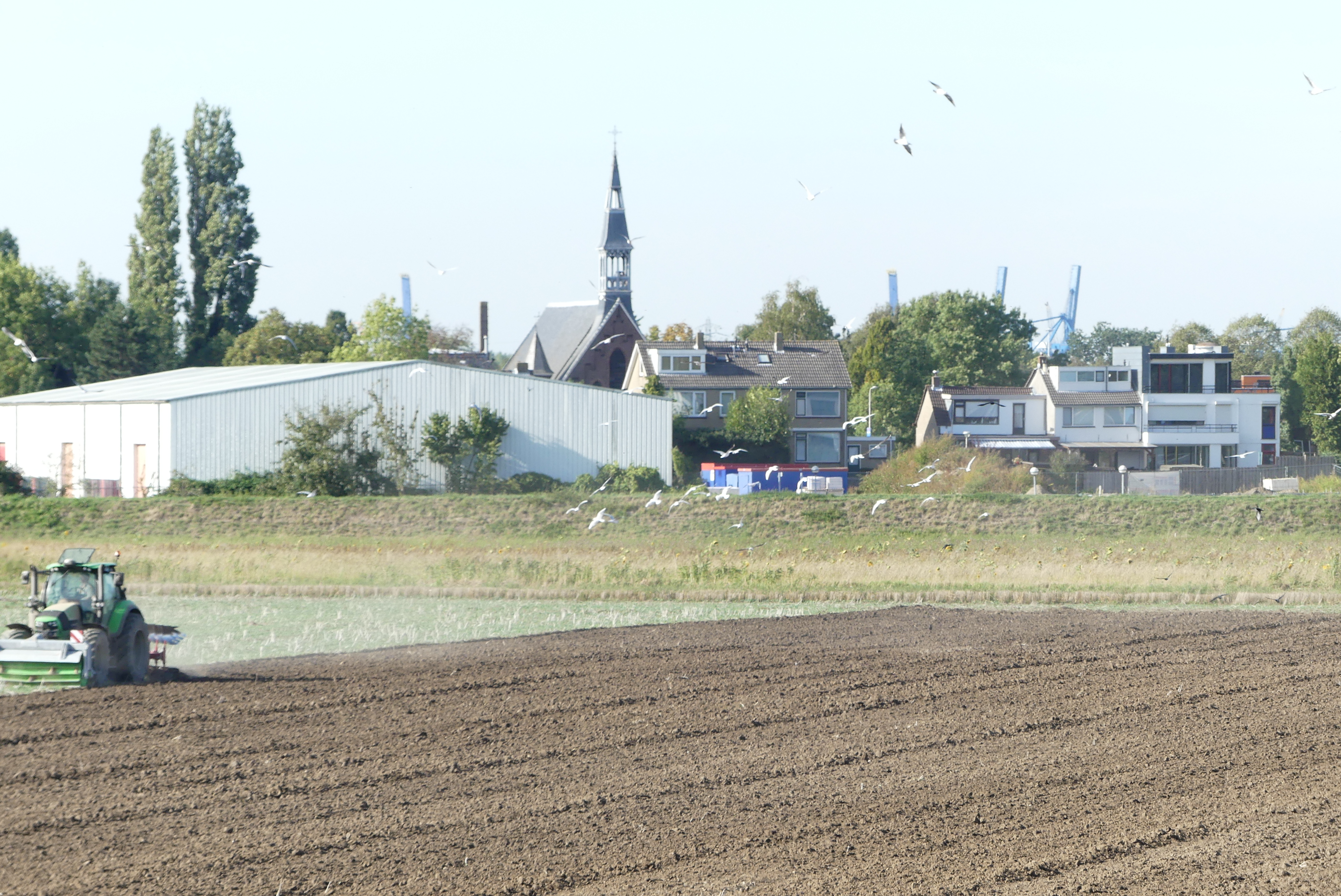 Zicht op woningen in Rhoon in de provincie Zuid-Holland